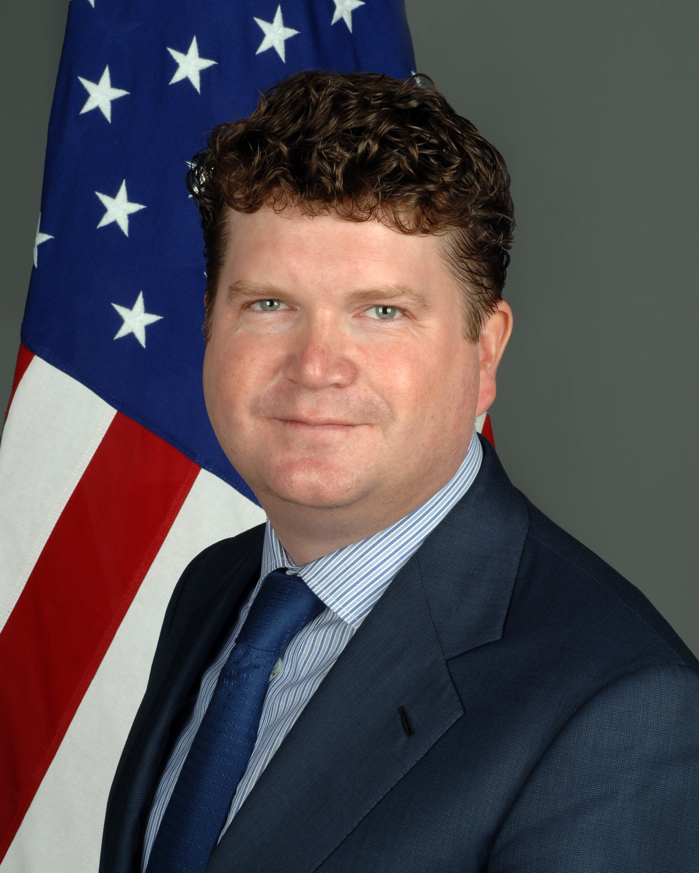 Matthew Barzun (född 1970), USA:s ambassadör i Sverige.